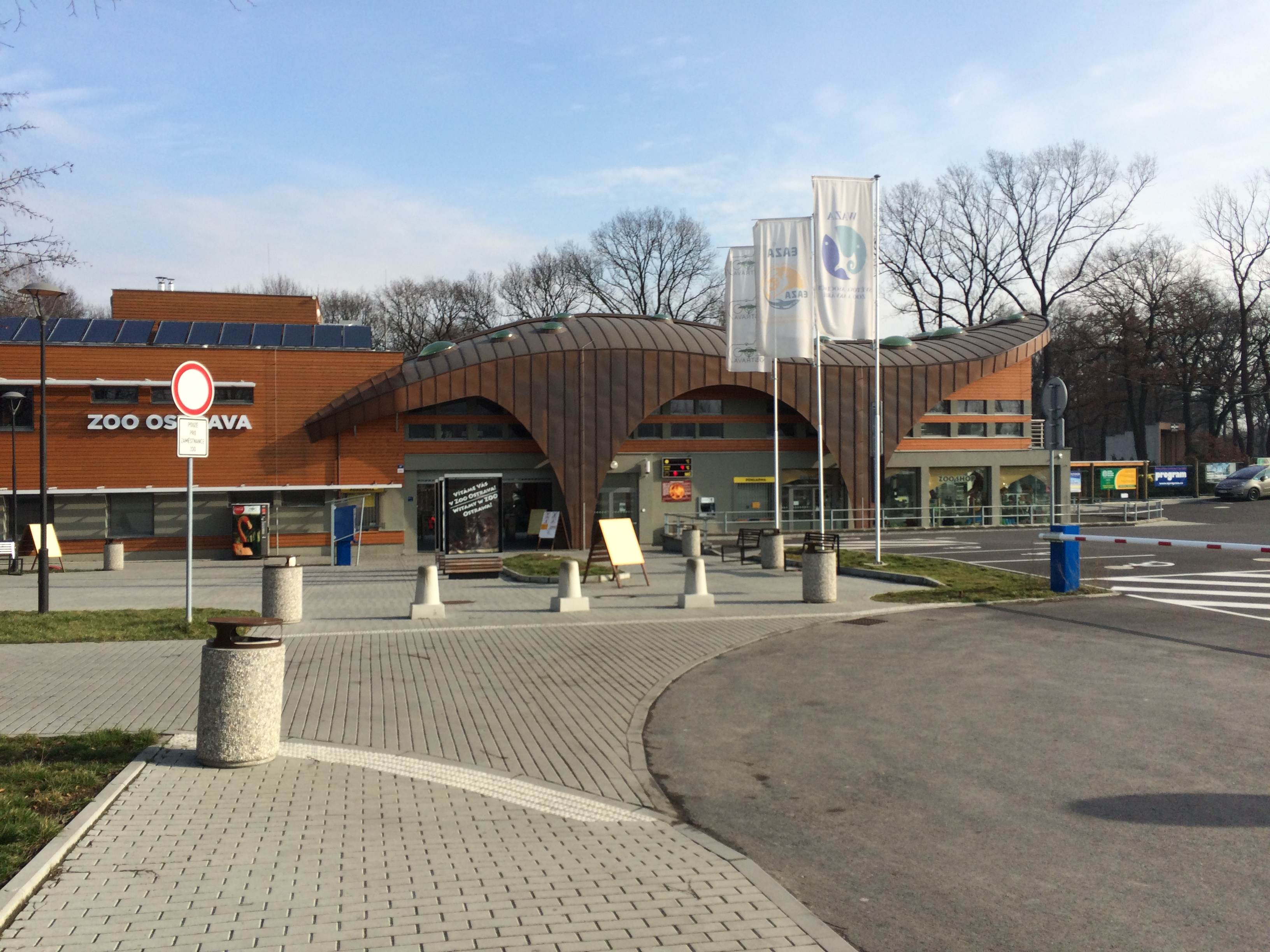 Nový hlavní vchod do ostravské zoologické zahrady (únor 2016)